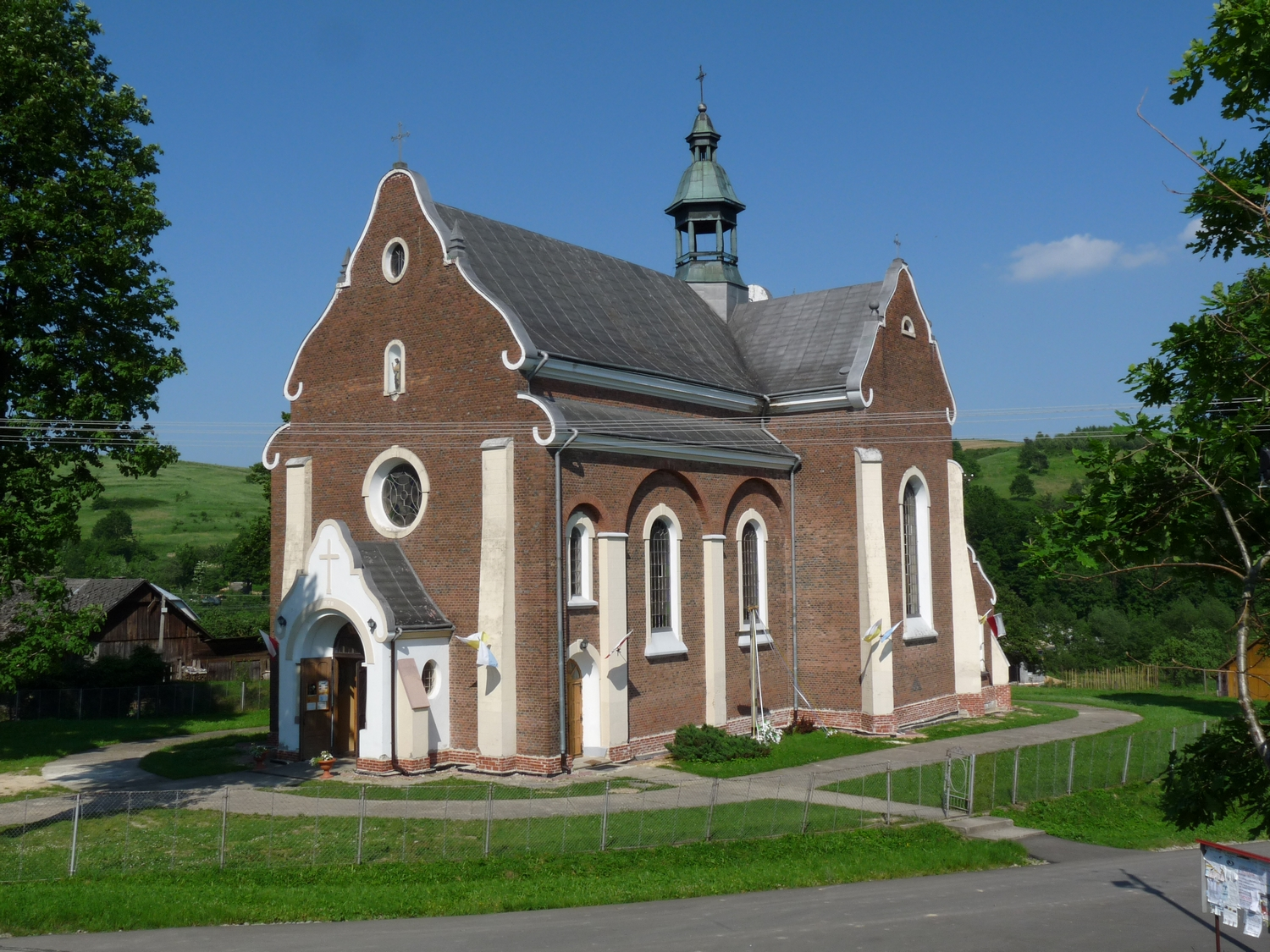 Łubno - kościół św. Jana Chrzciciela